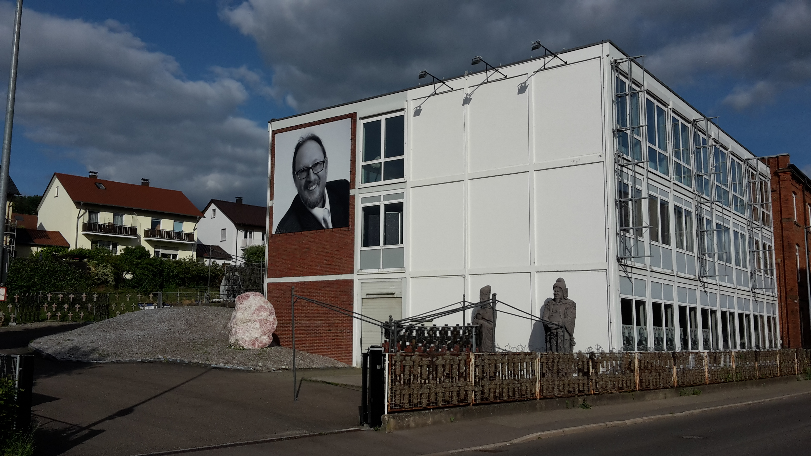 Lichtkristallzentrum